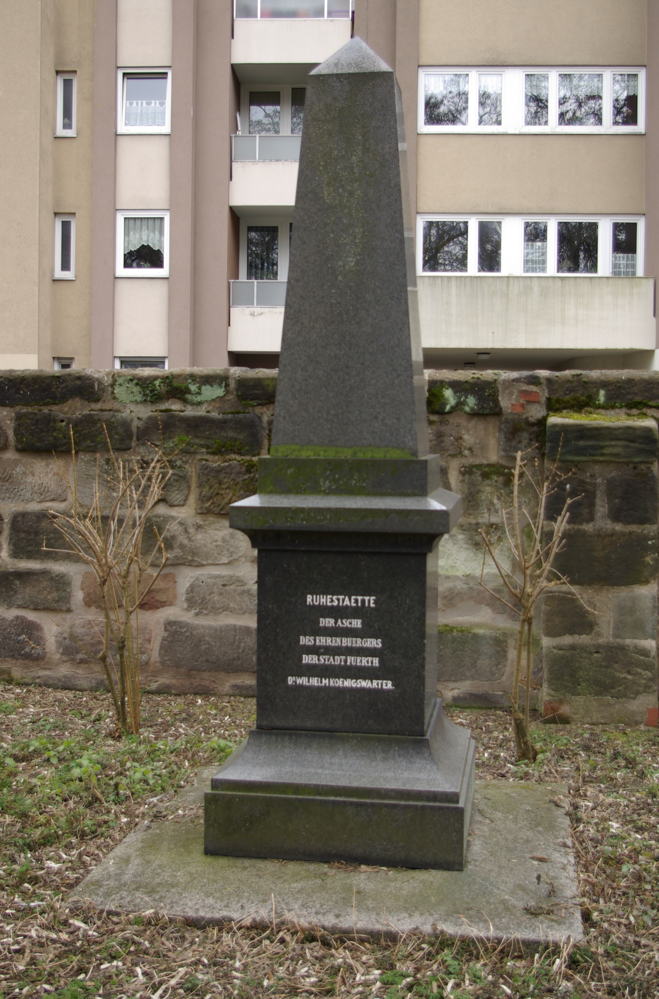 Alter Jüdischer Friedhof in Fürth. (Urnen-)Grab von Wilhelm Königswarter.